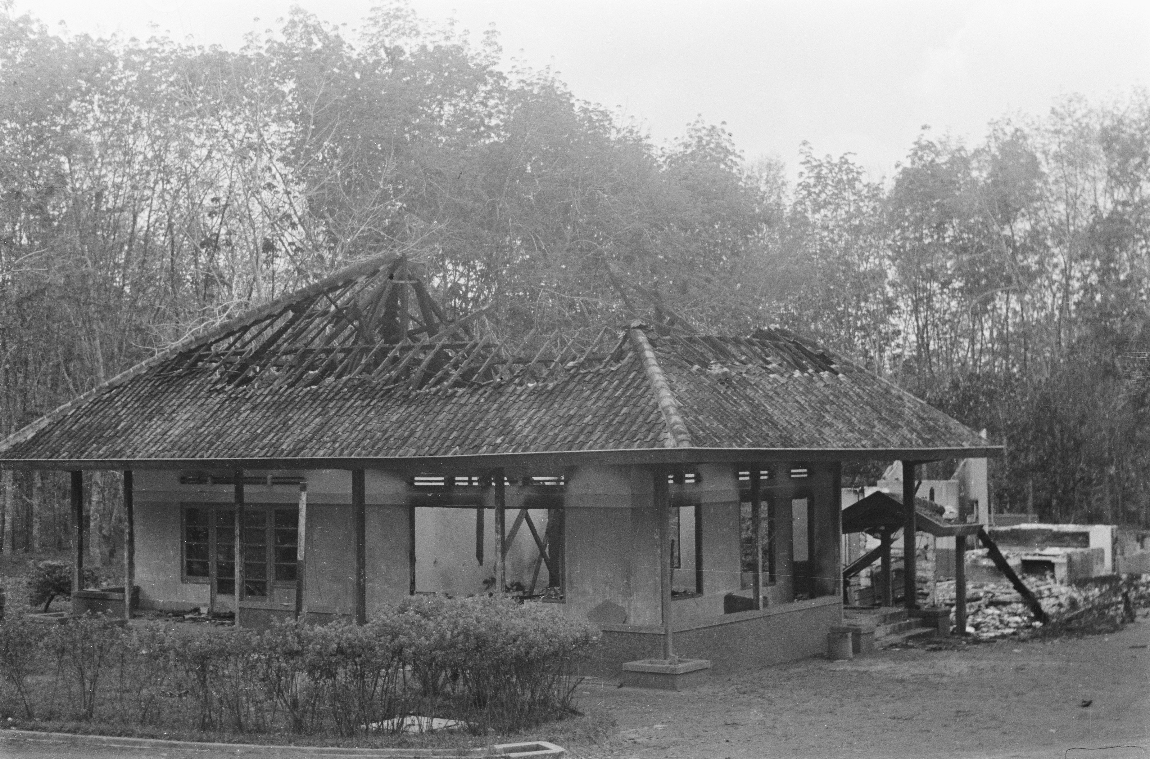 Collectie / Archief : Fotocollectie Dienst voor Legercontacten Indonesië Reportage / Serie : [DLC] Palembang Beschrijving : Gebouwen op de rubberonderneming "Tebenan" werden door de TNI in brand gestoken Datum : juli 1947 Locatie : Indonesië, Nederlands-Indië, Sumatra Fotograaf : Fotograaf Onbekend / DLC Auteursrechthebbende : Nationaal Archief Materiaalsoort : Negatief (zwart/wit) Nummer archiefinventaris : bekijk toegang 2.24.04.03 Bestanddeelnummer : 338-4-1